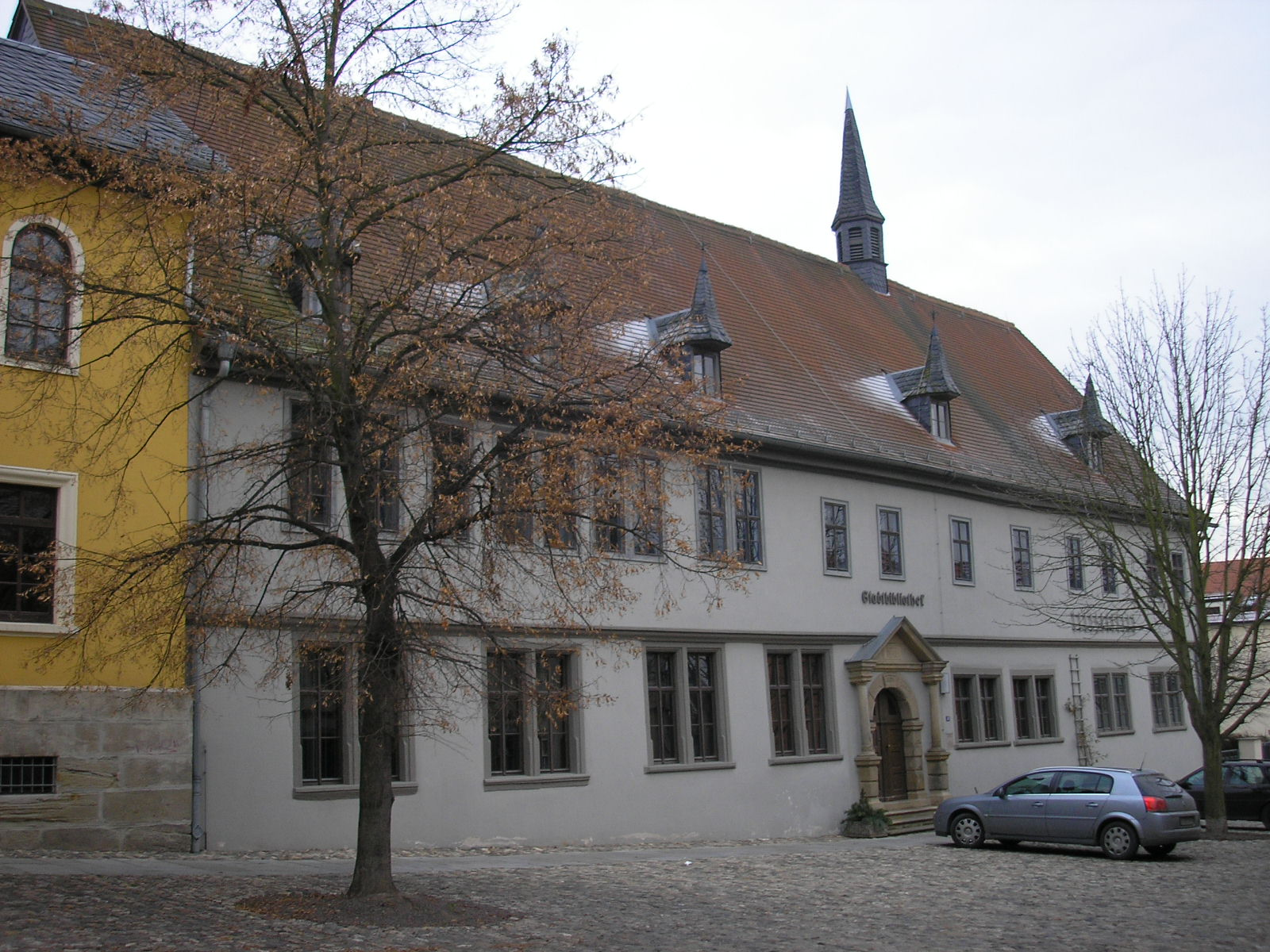 Ehemaliges Gymnasium, heute Bibliothek Rudolstadt (Thüringen).